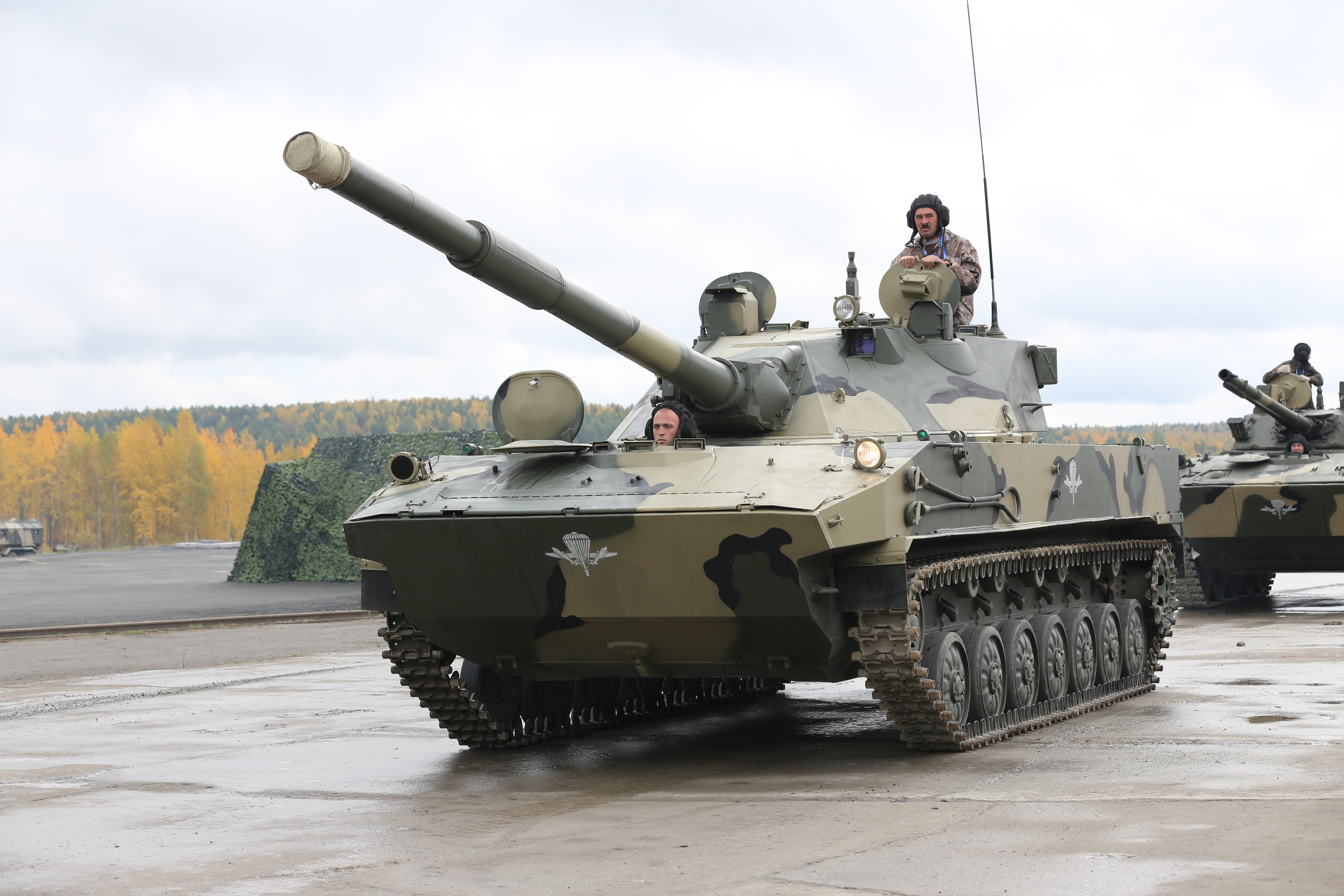 2С25 Спрут-СД (2S25 Sprut-SD)